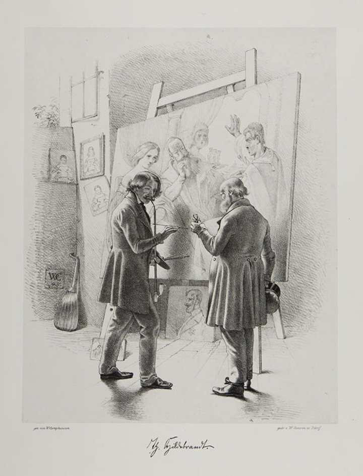 Ferdinand Theodor Hildebrandt in seinem Atelier, "Othello und Desdemona" malend, Illustration von Wilhelm Camphausen in Schattenseiten der Düsseldorfer Maler, 1845